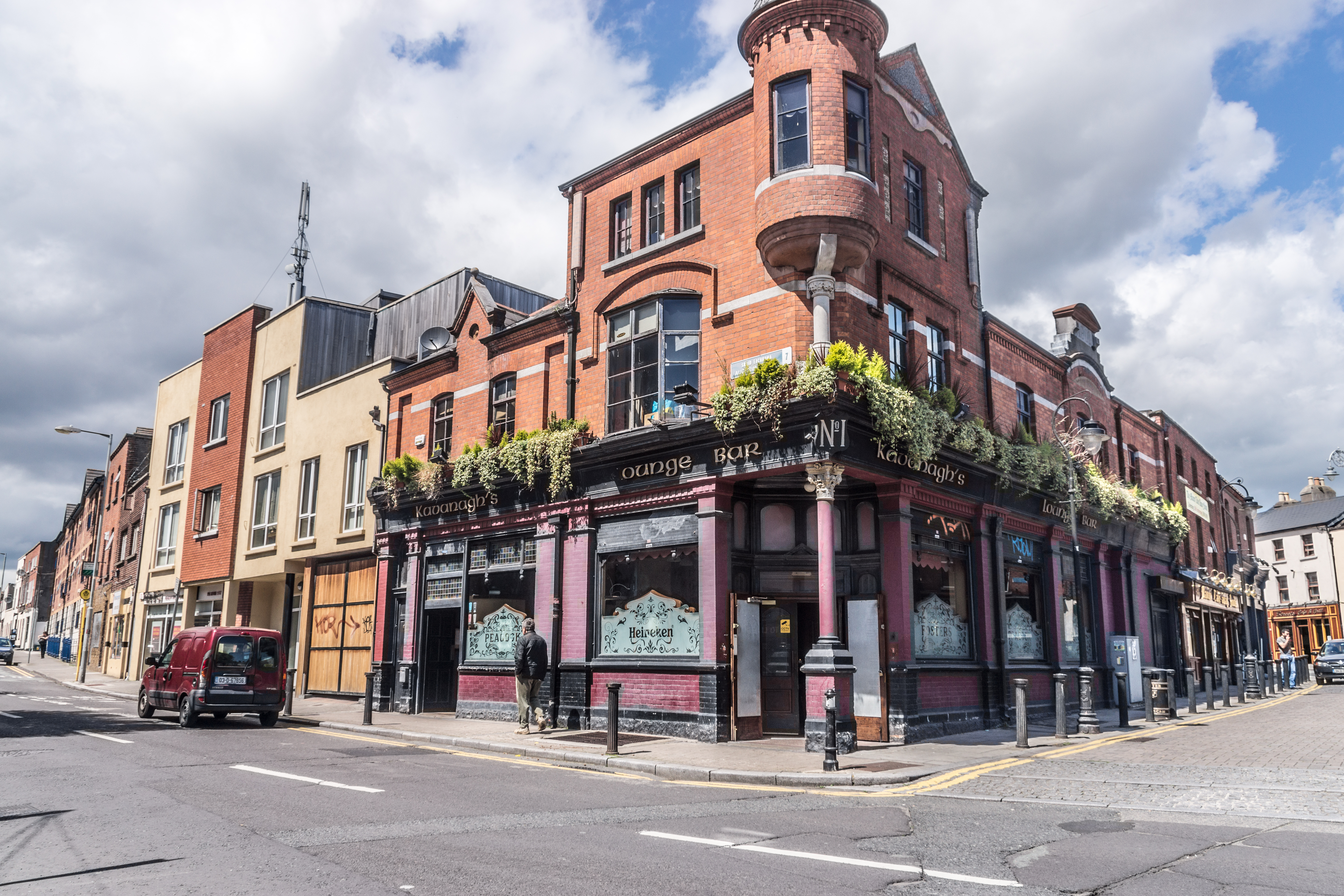 Stoneybatter - Dublin